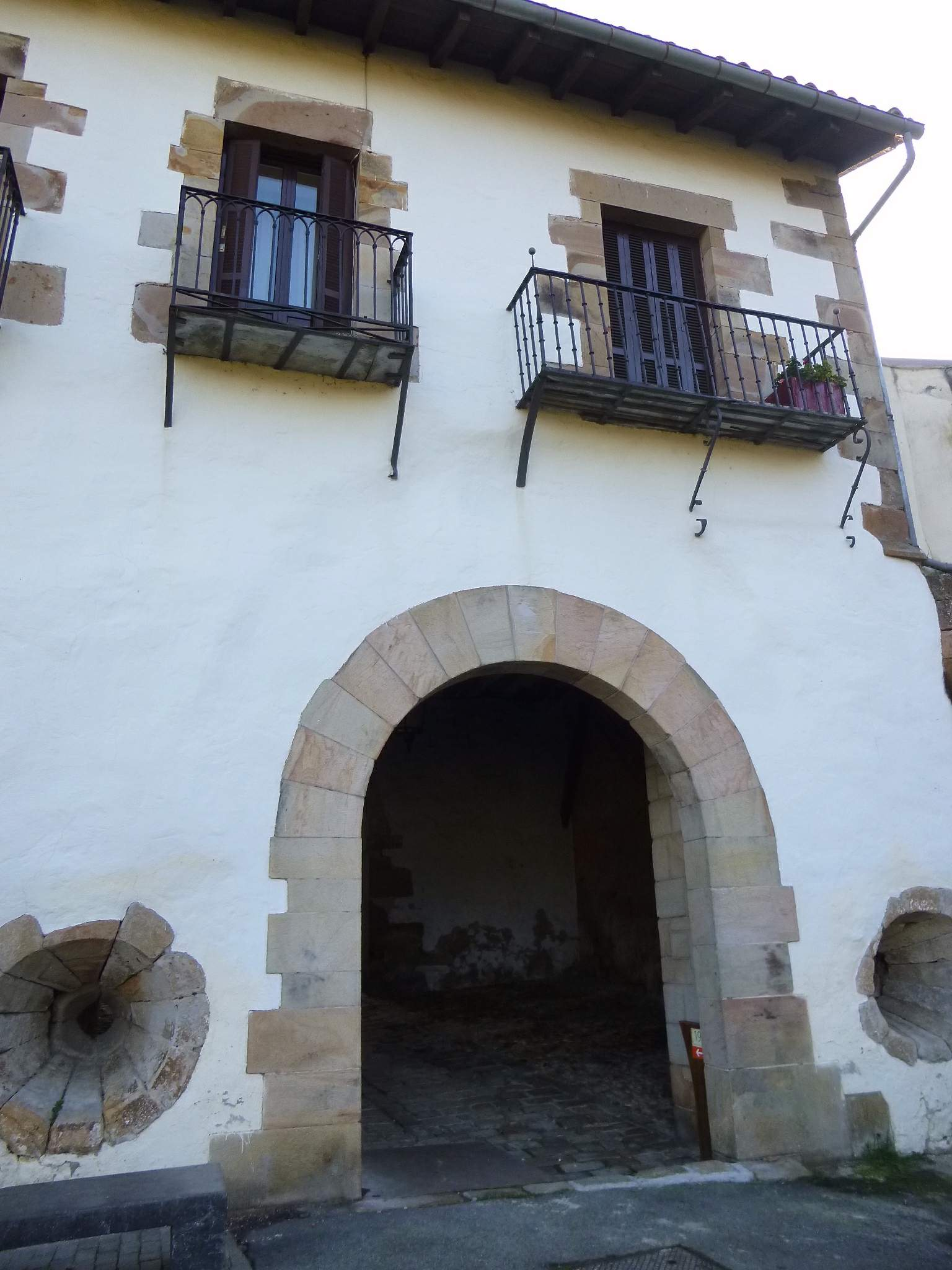 Segura (Gipuzkoa) - Portal de Zerain